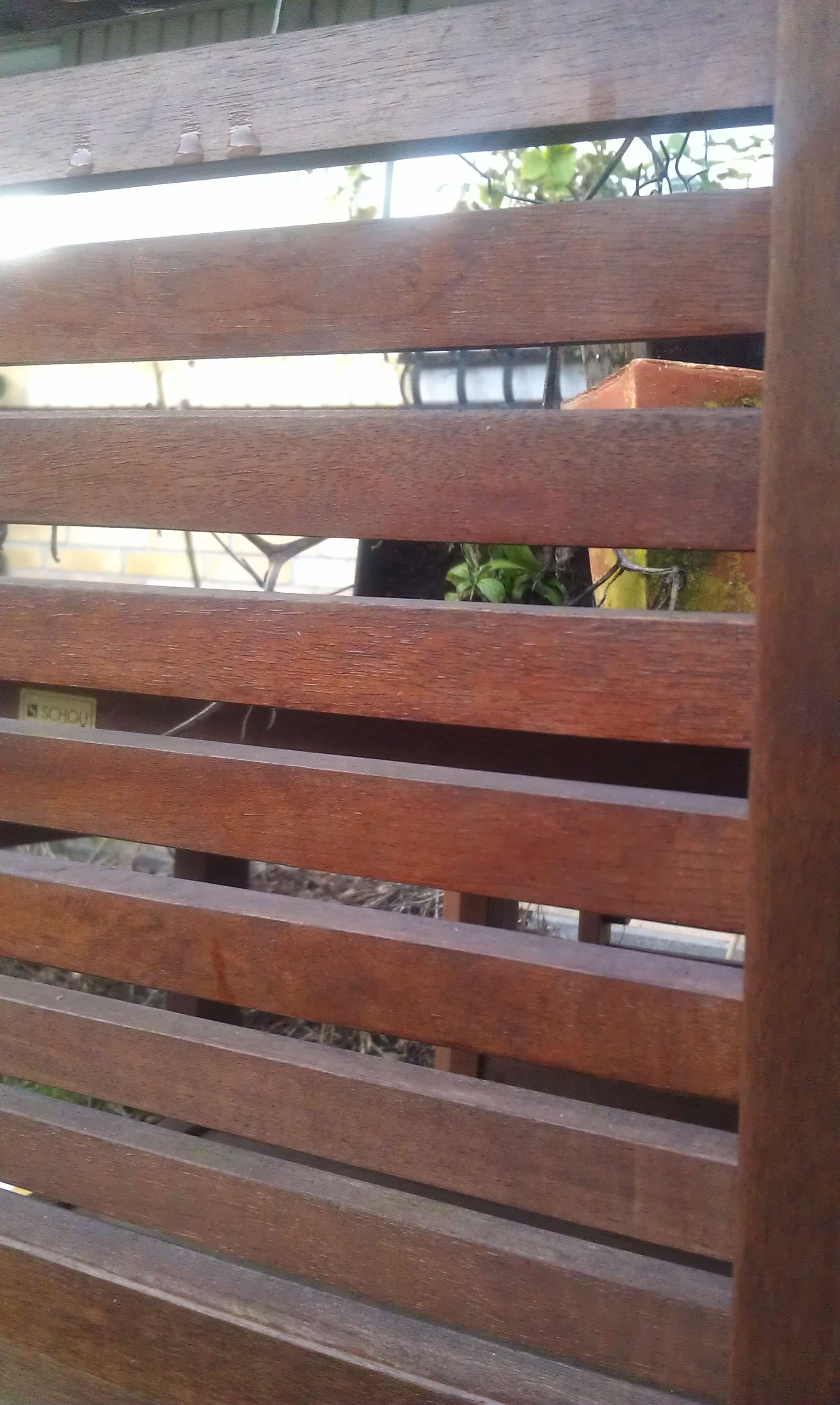 Havemøbel behandlet med tørrende olie